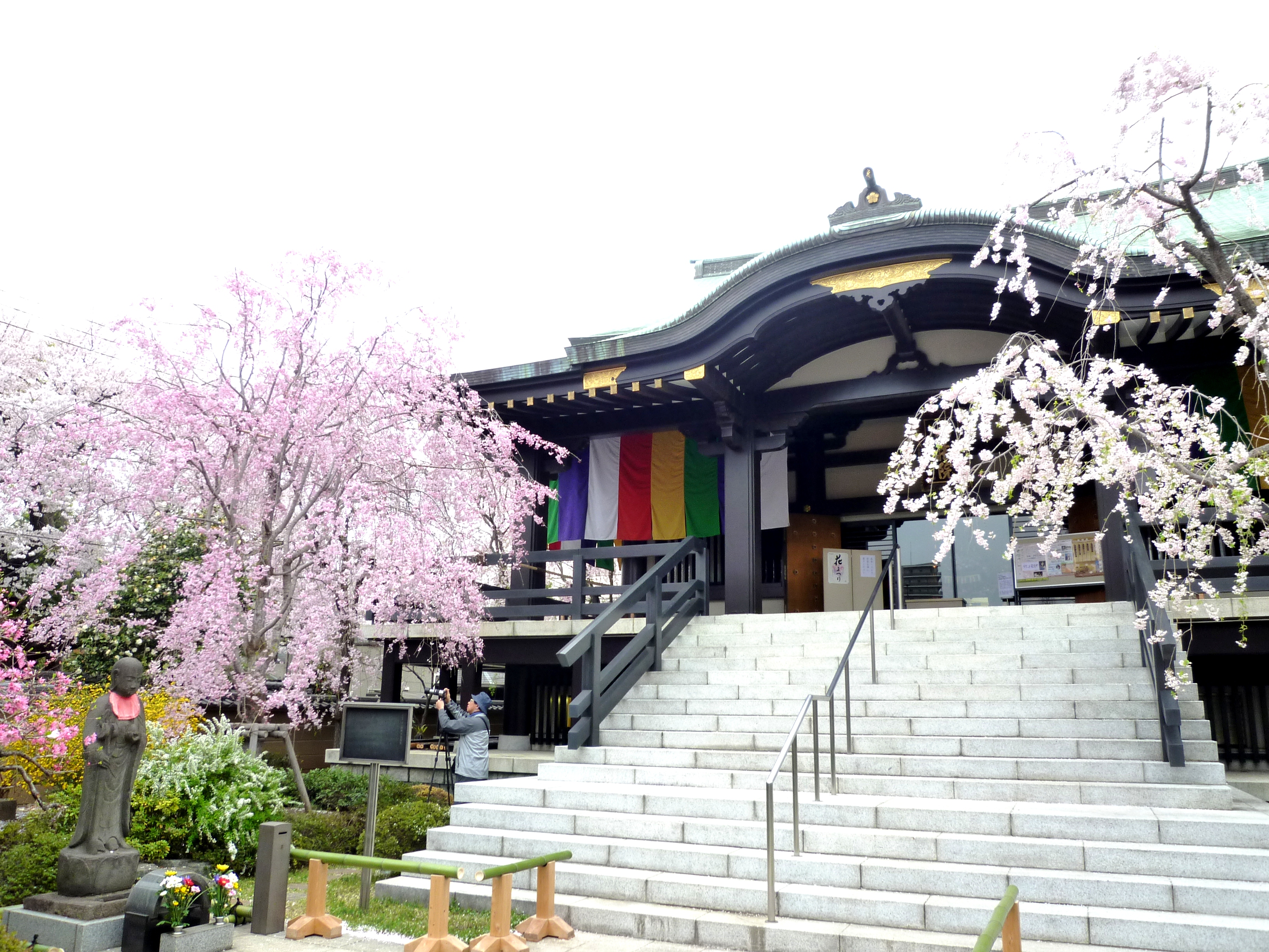 南蔵院のしだれ桜